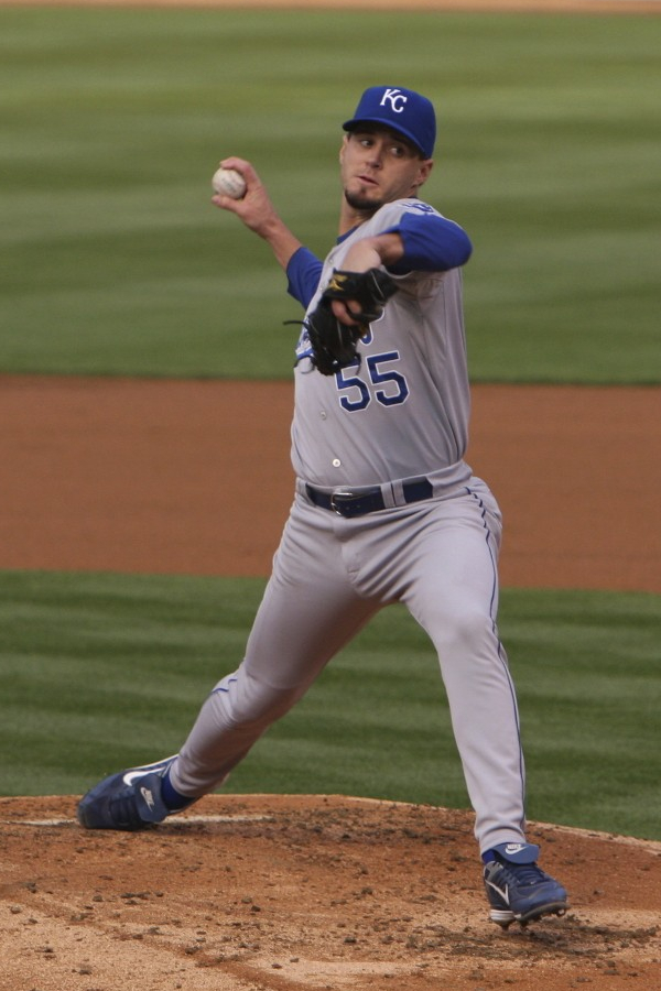 Gil Meche